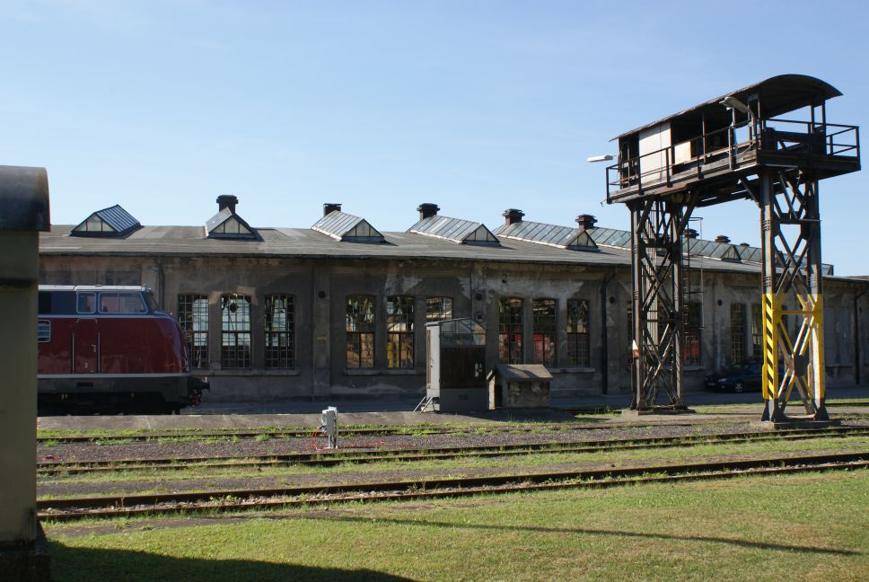 Blick auf den nördlichen Ringlockschuppen des ehemaligen Bw Augsburg